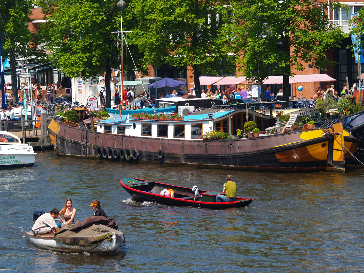 Hausboot in Amsterdam